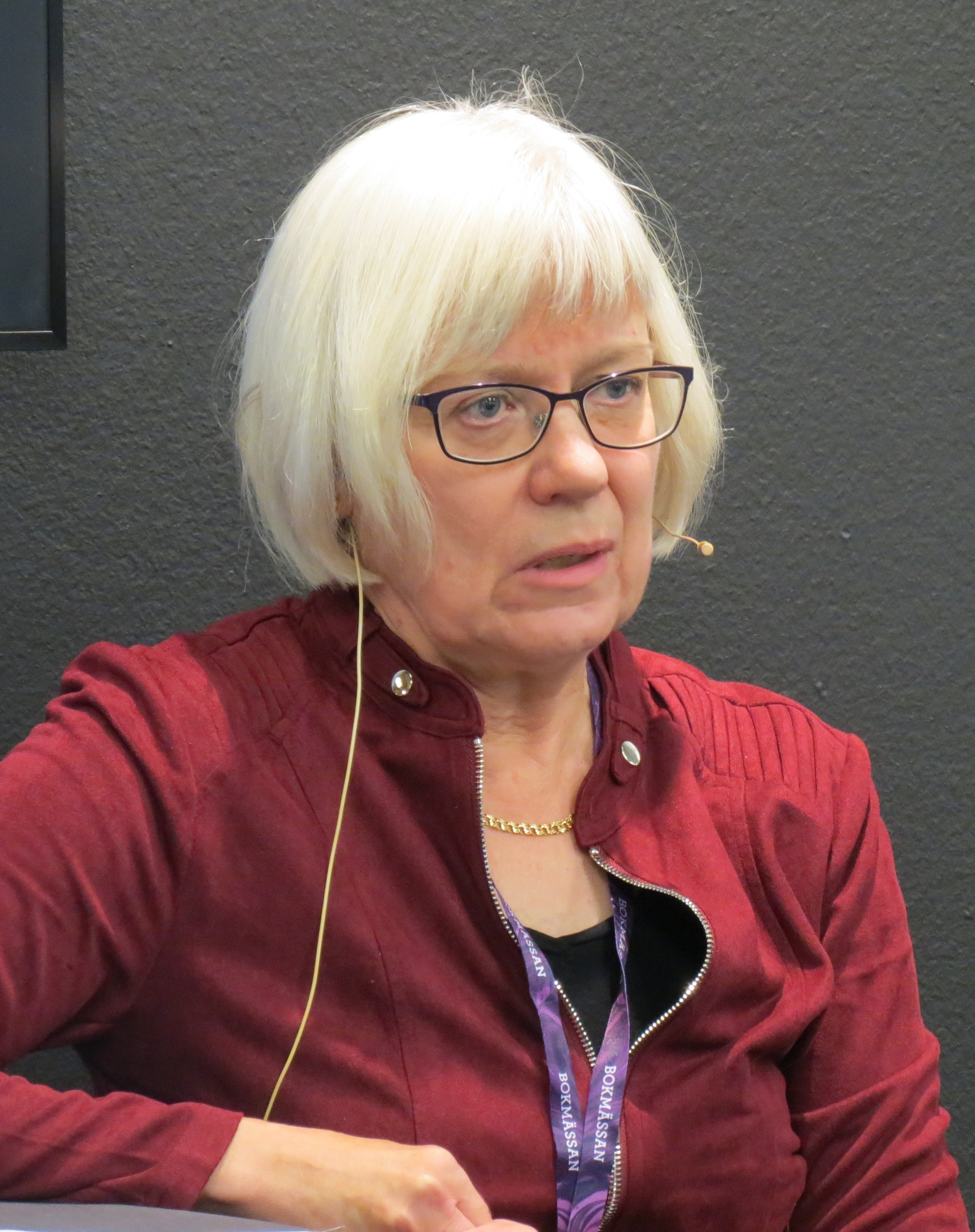 Professor Anna Götlind föreläser på Bokmässan i Göteborg 2019.